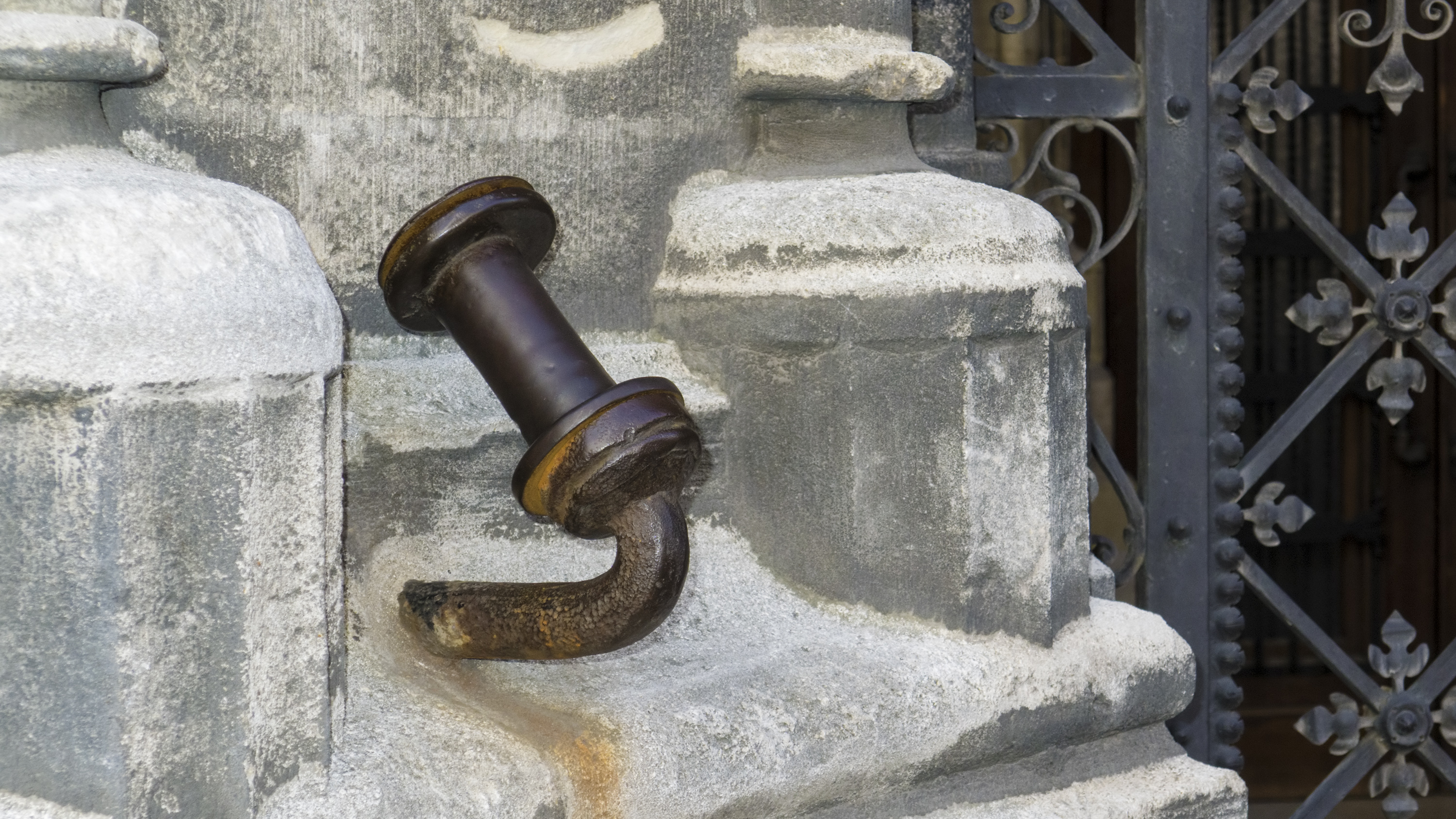 Mittelalterliche Umlenkrolle am Adlertor des Stephansdoms in Wien 1